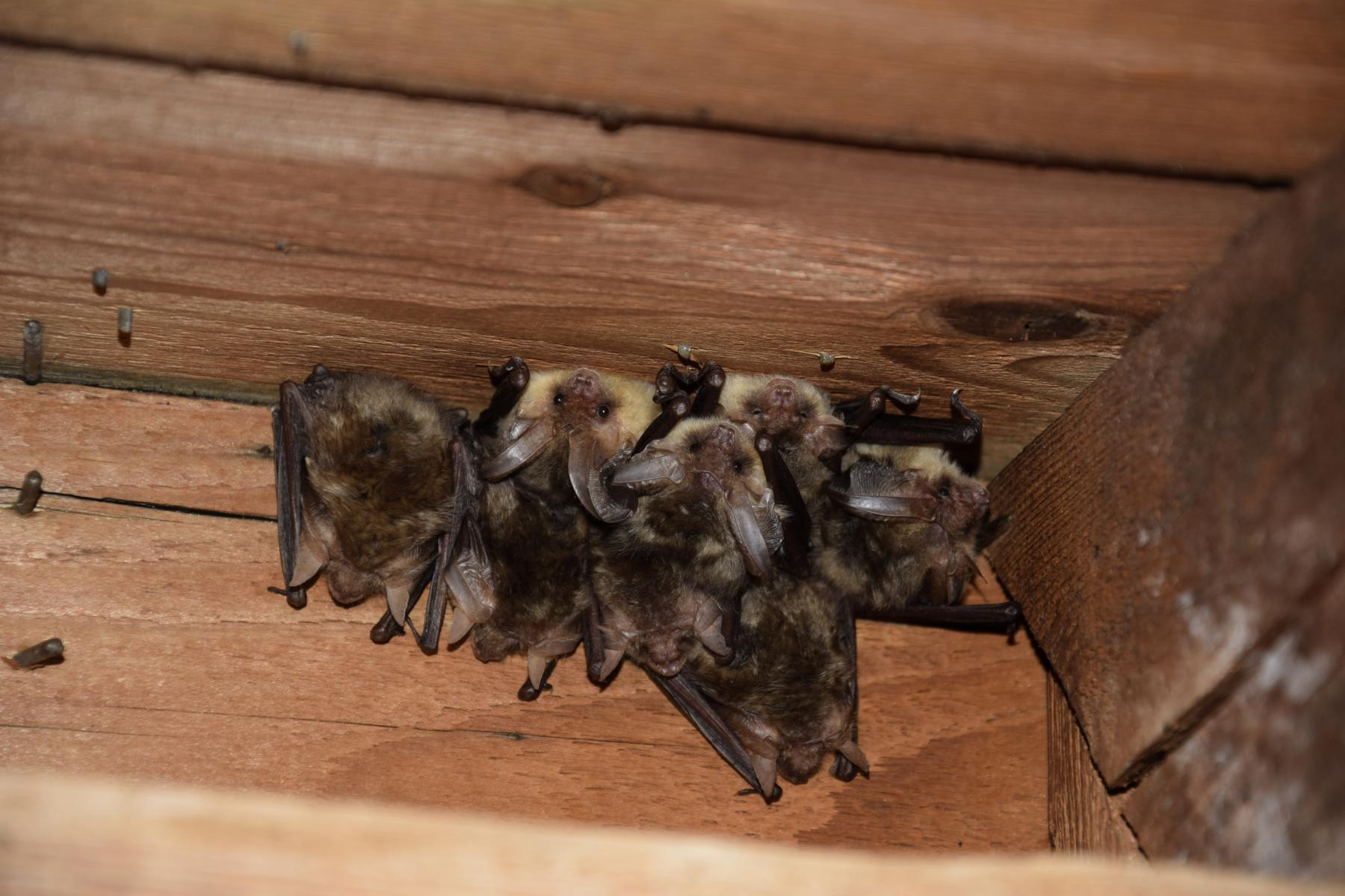 Wochenstube des Braunen Langohrs (Plecotus auritus) im Dachstuhl einer Kirche im Mai vor der Jungtiergeburt.